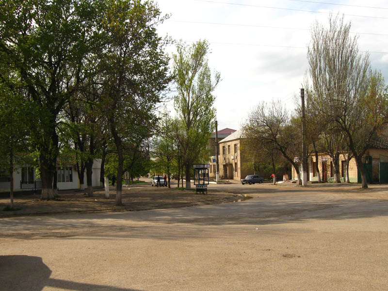 Berezivka city